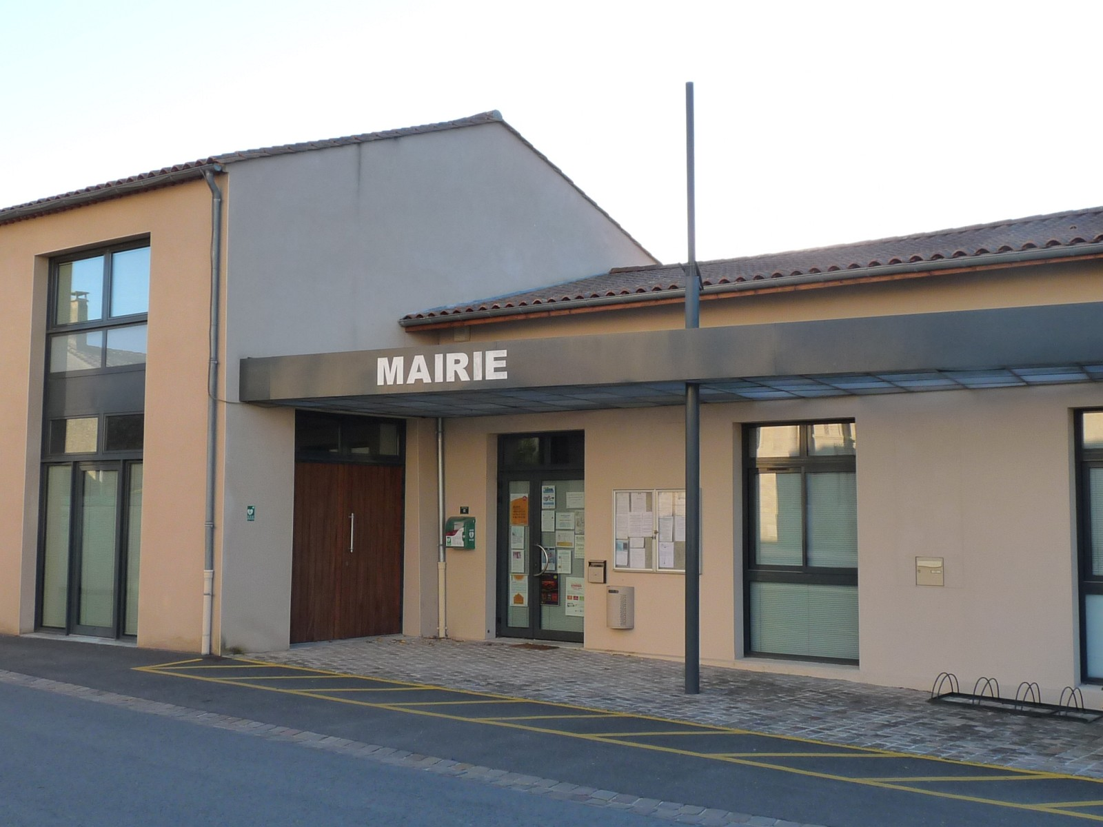 Mairie de Mazion, Gironde, France